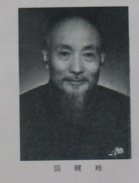 中文（台灣）: 中國人民政治協商會議第一屆全體會議代表